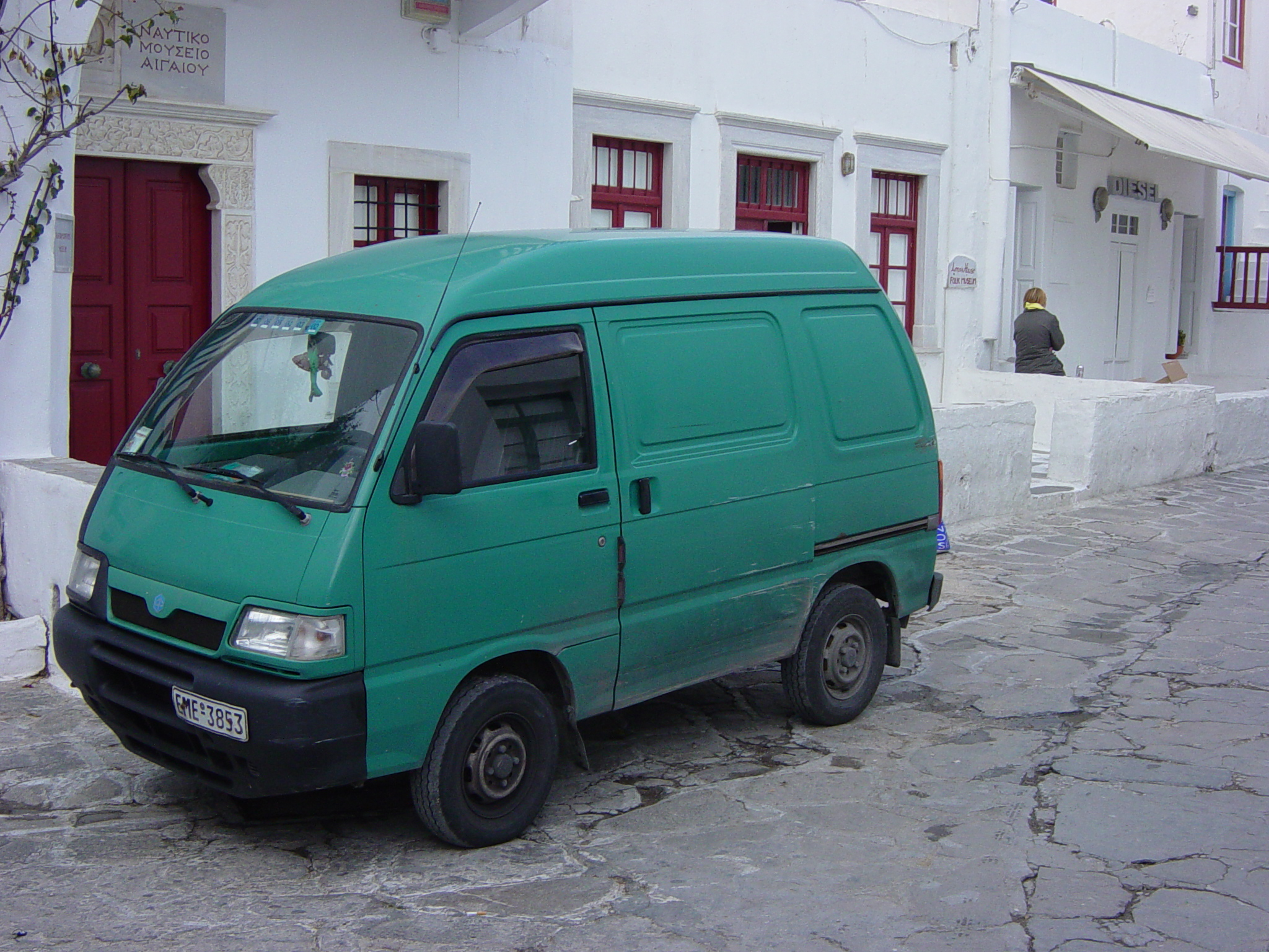 Piaggio van, seen on Mikinos, Greece. These vans are based on the seventh generation Daihatsu Hijet ( ja : ダイハツ・ハイゼット ).